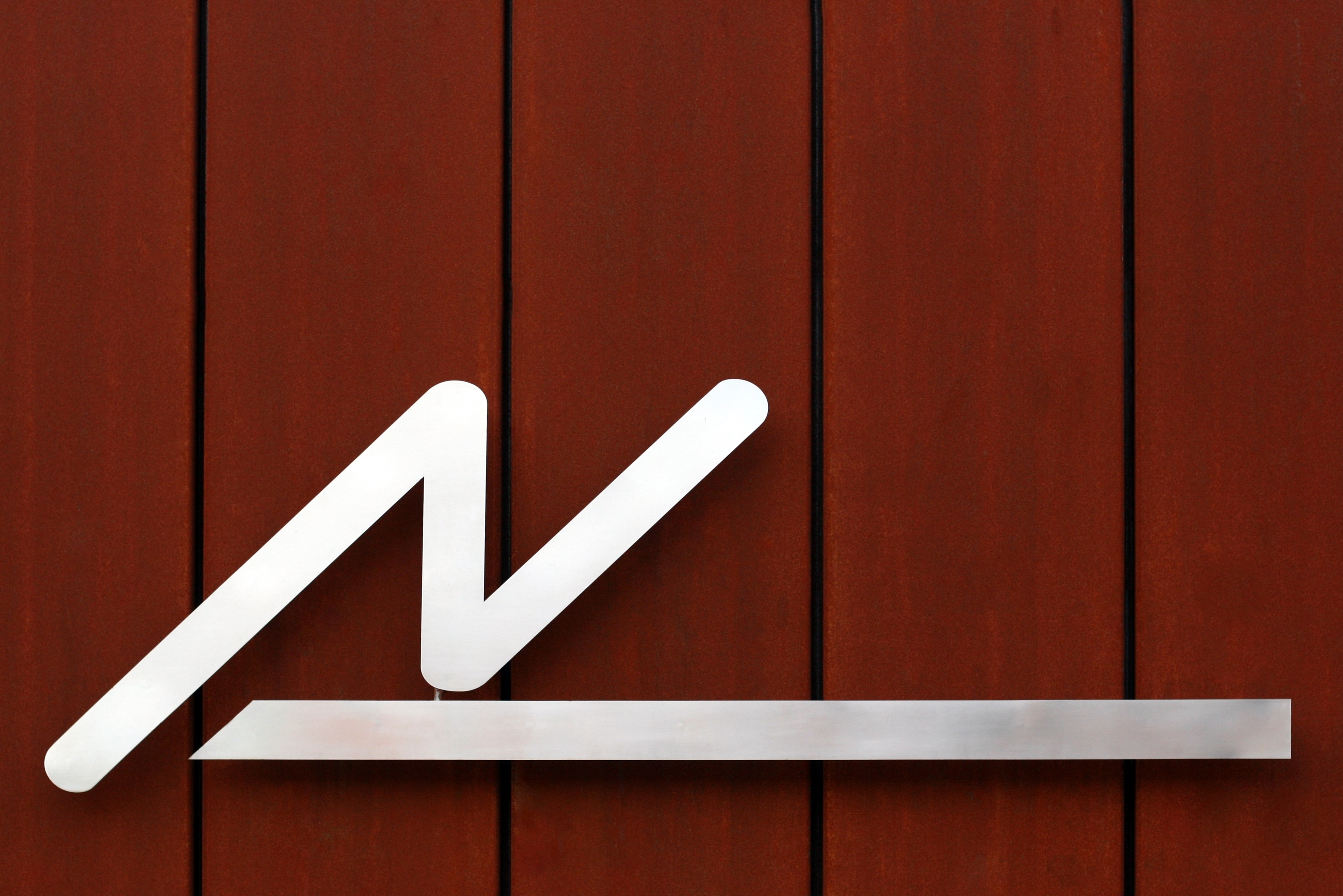 Notar, Notariat, Hartberg, Kennzeichnung an der Fassade, Notariatskammer, Rost in der Architektur